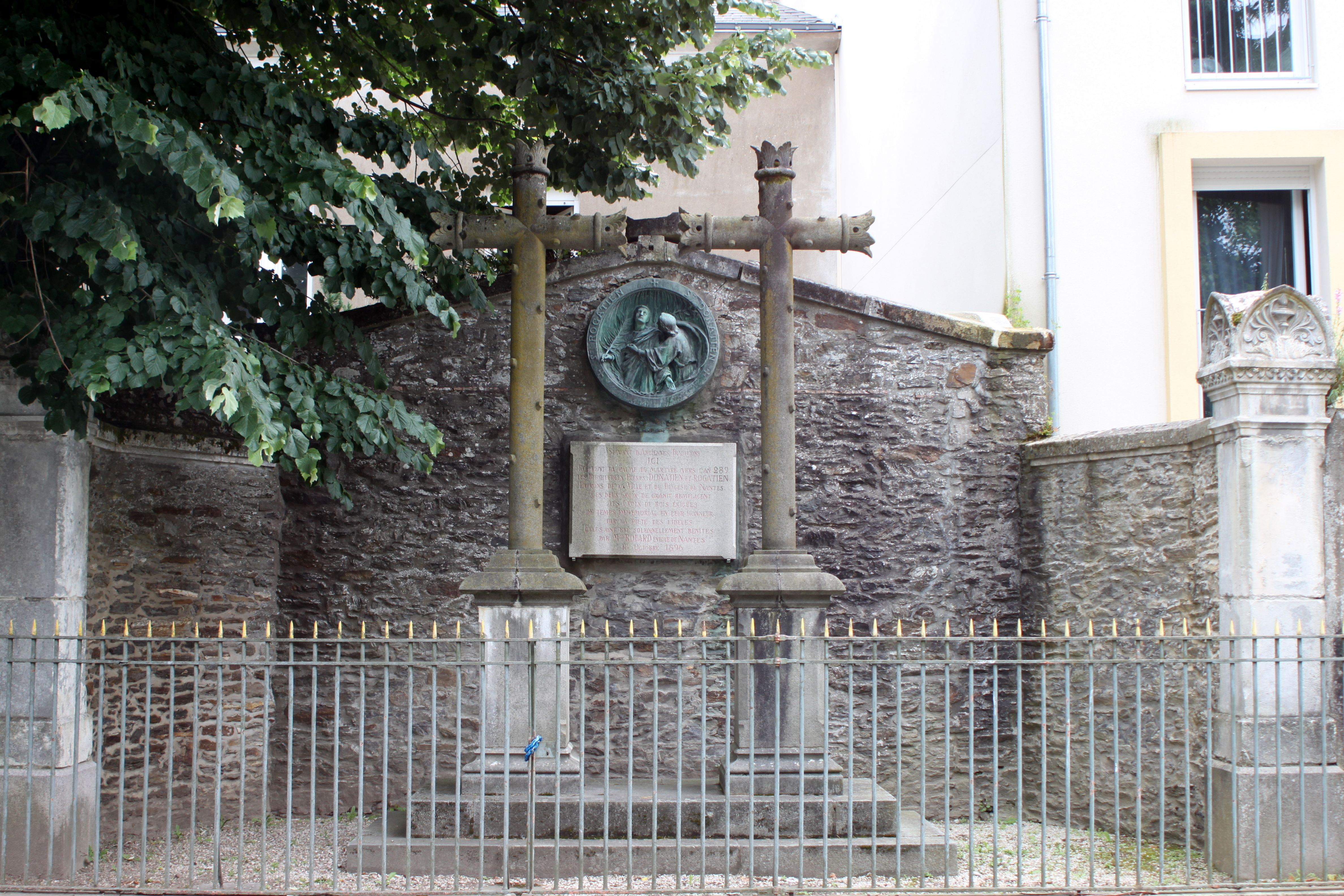 Monument à Saint-Donatien et Saint-Rogatien (médaillon par Joseph Vallet), rue Dufour, Fr-44-Nantes.